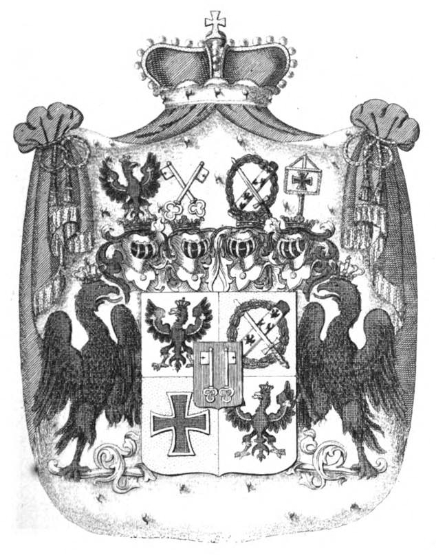 Wappen Blücher von Wahlstadt - Tyroff HA.jpg